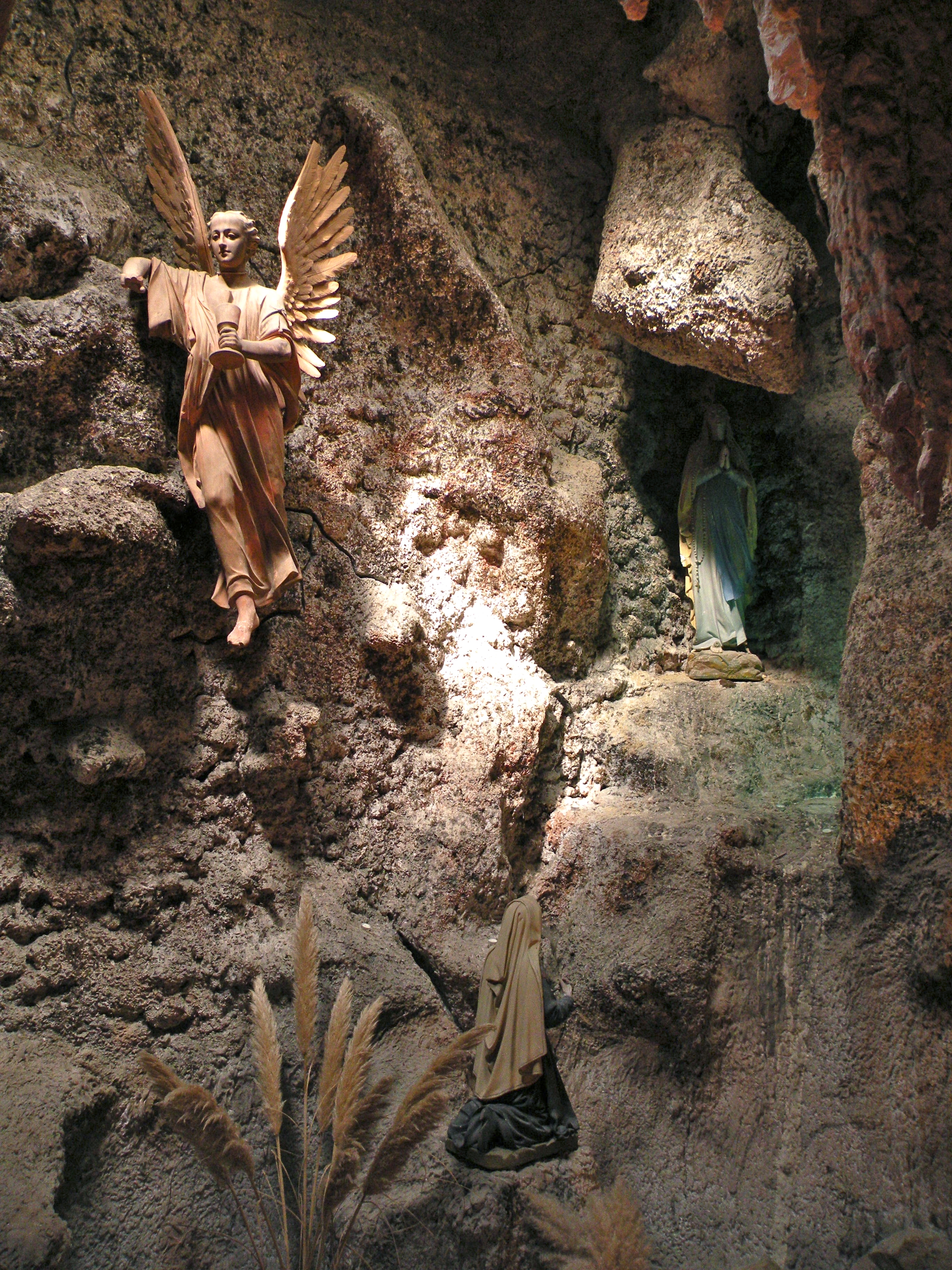 Grotte de Lourdes (attenante au bas-côté nord).